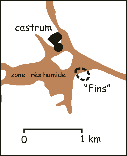 auteur : Utilisateur:Laurent Deschodt Catégorie:Cartes et plans de Lille